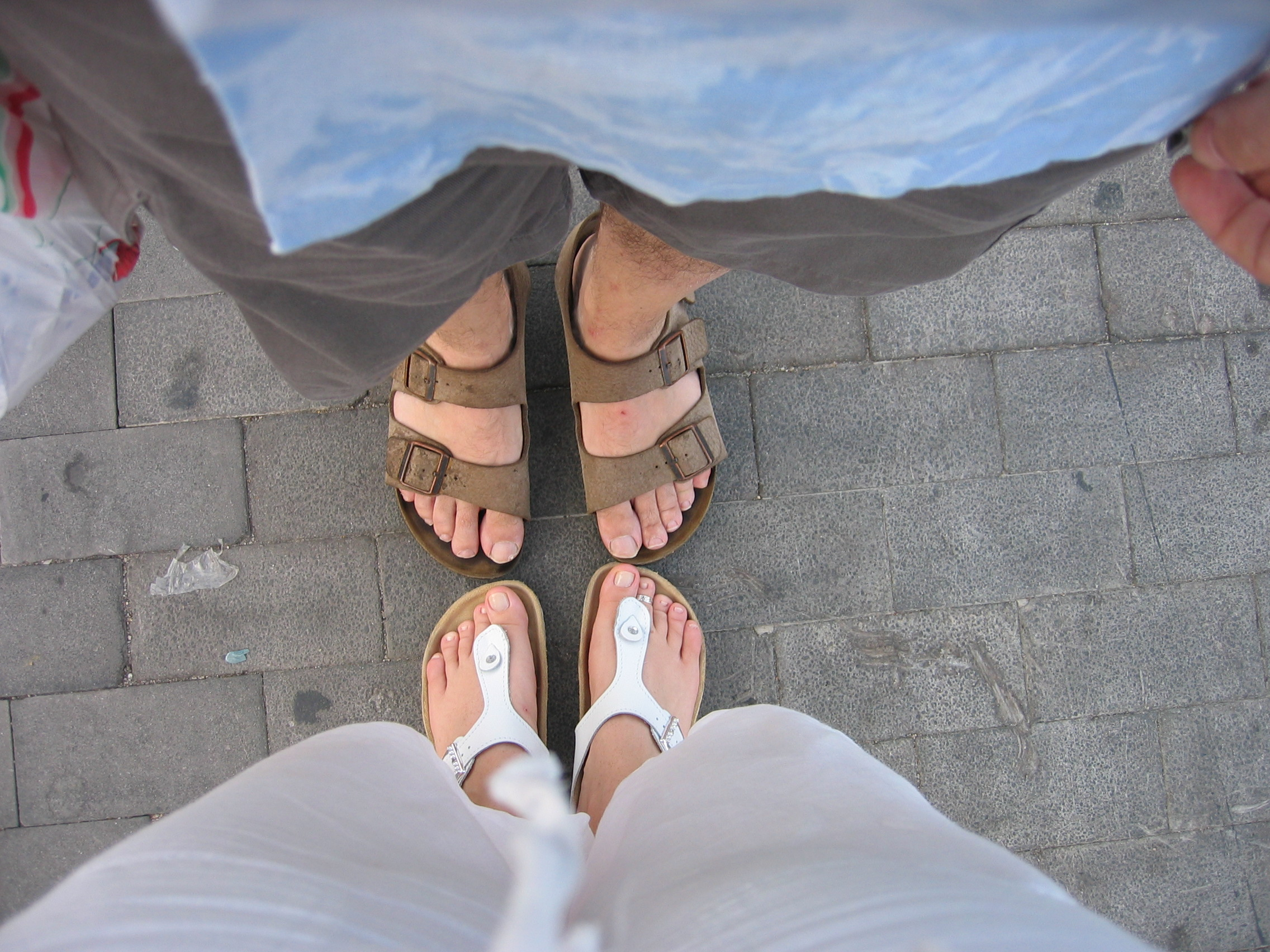 Feet